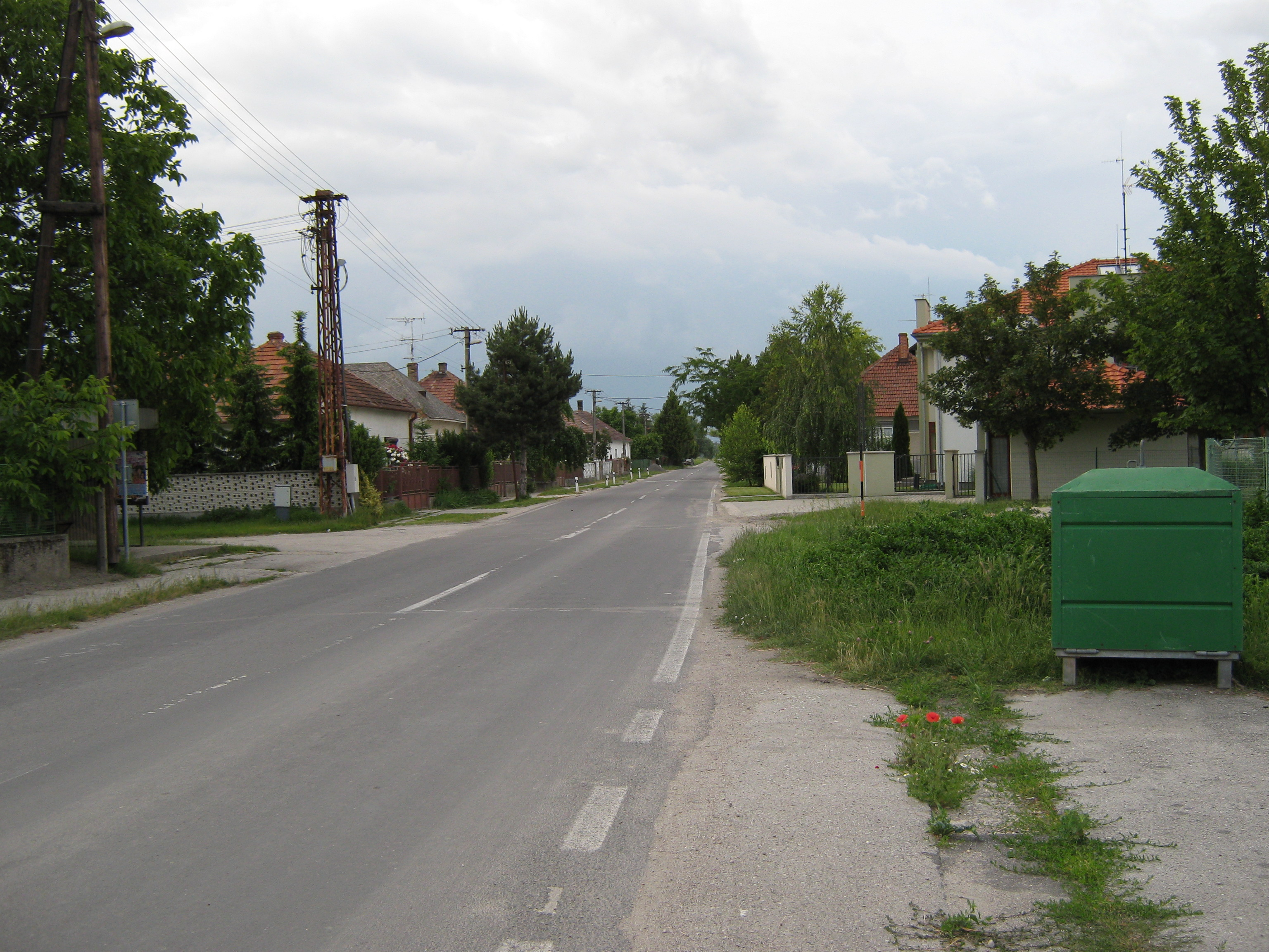 Medvei utcarészlet (3)